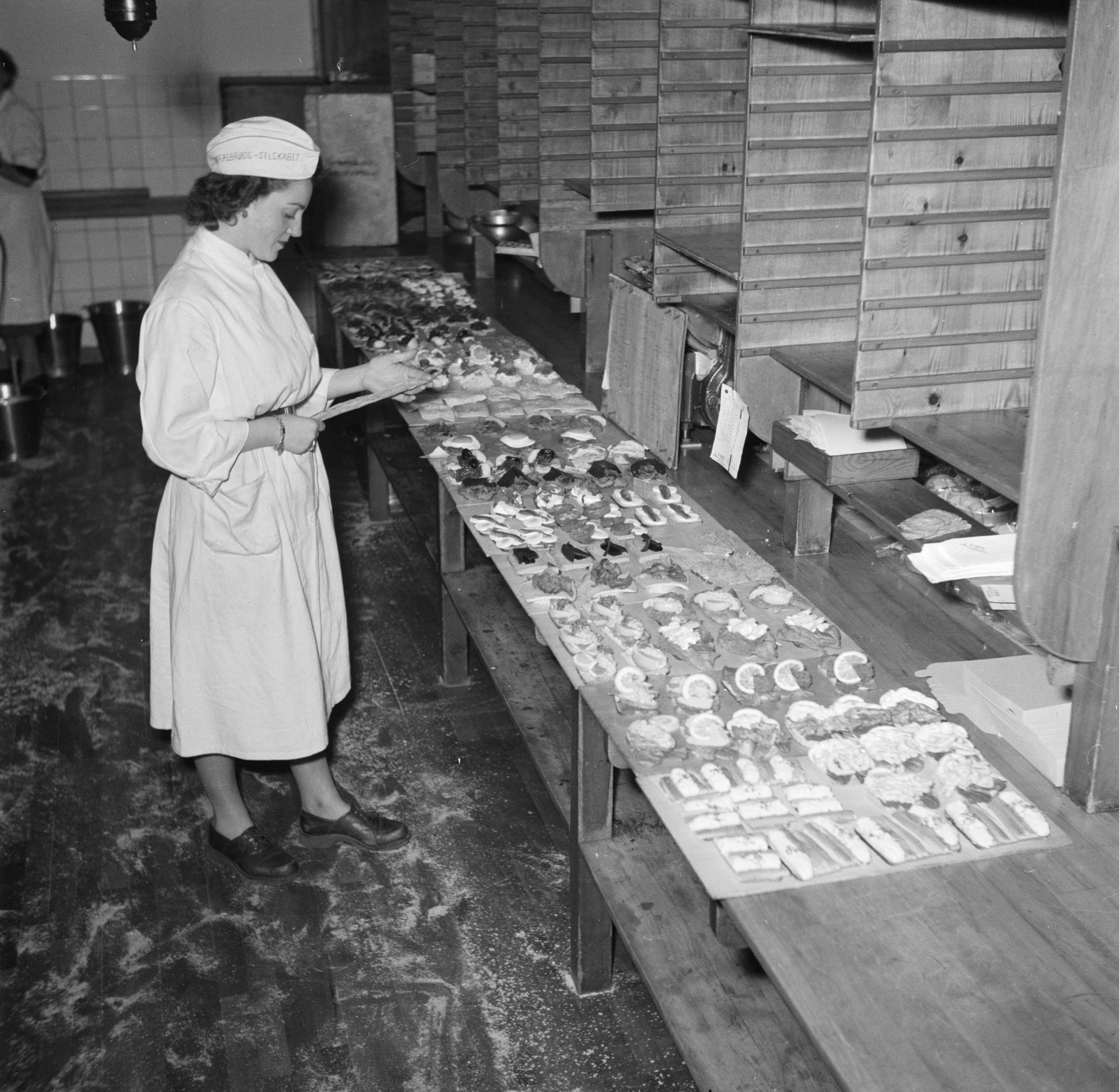 Collectie / Archief : Fotocollectie Van de Poll Reportage / Serie : Smørrebrød restaurant Oskar Davidsen Beschrijving : Koks in een productie keuken bereiden grote hoeveelheden smørrebrød Datum : maart 1954 Locatie : Denemarken, Kopenhagen Trefwoorden : brood, broodbeleg, keukens, koks, maaltijden, voedselbereiding Fotograaf : Poll, Willem van de, [onbekend] Auteursrechthebbende : Nationaal Archief Materiaalsoort : Negatief (zwart/wit) Nummer archiefinventaris : bekijk toegang 2.24.14.02 Bestanddeelnummer : 252-9044